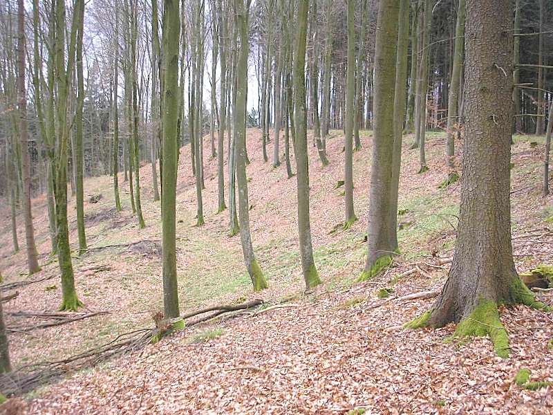 Frühmittelalterliche Schanze Wagesenberg bei Pöttmes (Landkreis Aichach-Friedberg, Bayerisch-Schwaben). Die Ostseite der Schanze nach Süden. Eigene Aufnahme, März 2008 / Early Middle Ages hillfort Wagesenberg near Poettmes (Landkreis Aichach-Friedberg, Bavaria, Germany).The eastern part of the hillfort, looking south. Own photo, March 2008